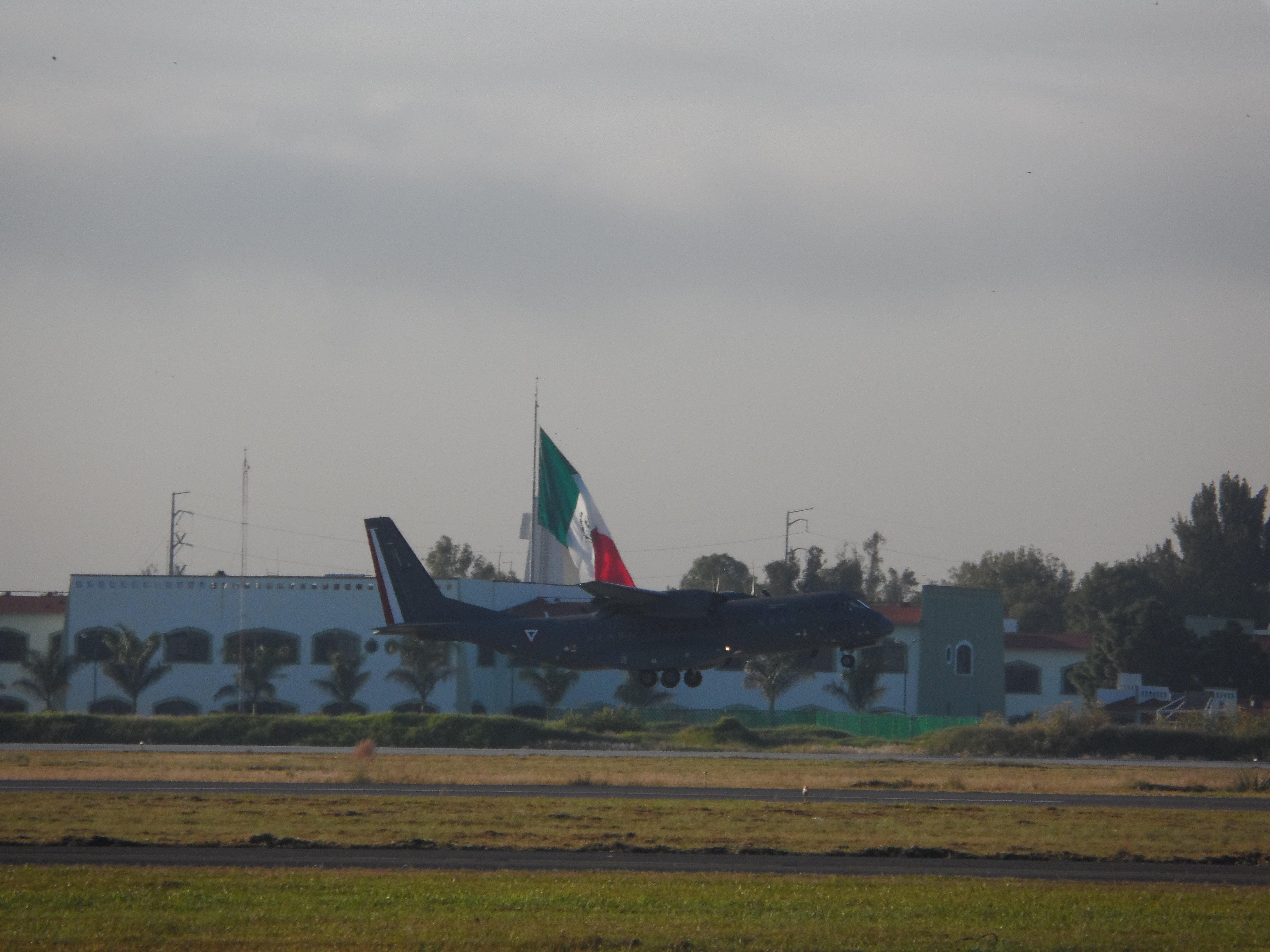 Avión CASA C-295M de la Fuerza Aérea Mexicana, perteneciente al Escuadrón Aéreo 301, aterrizando en la BAM No. 5, en Zapopan, Jalisco.